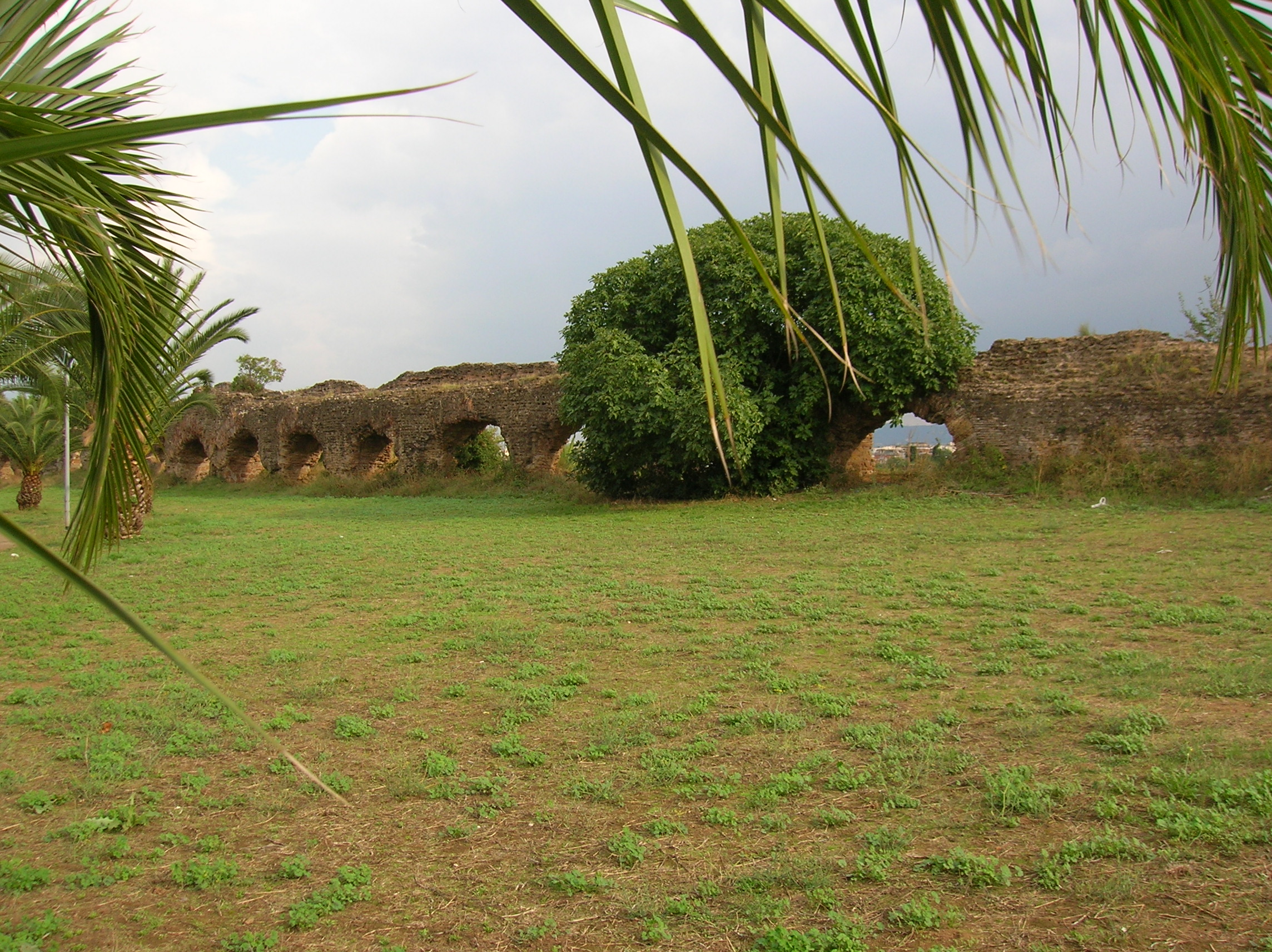 ParcoGiovanniPalatucci, Tor Tre Teste, Roma, Italia